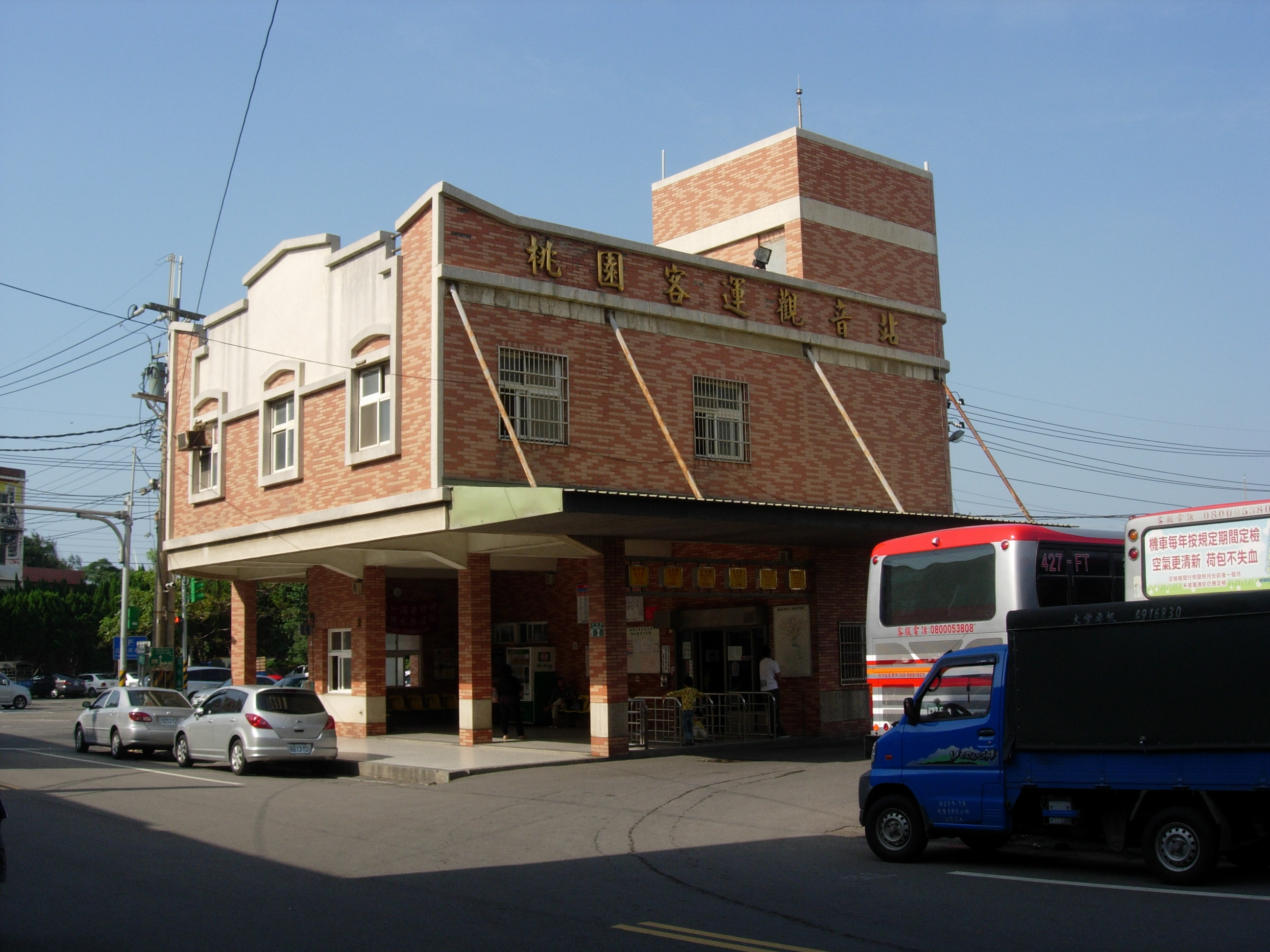 中文（台灣）: 桃園客運觀音站月台。